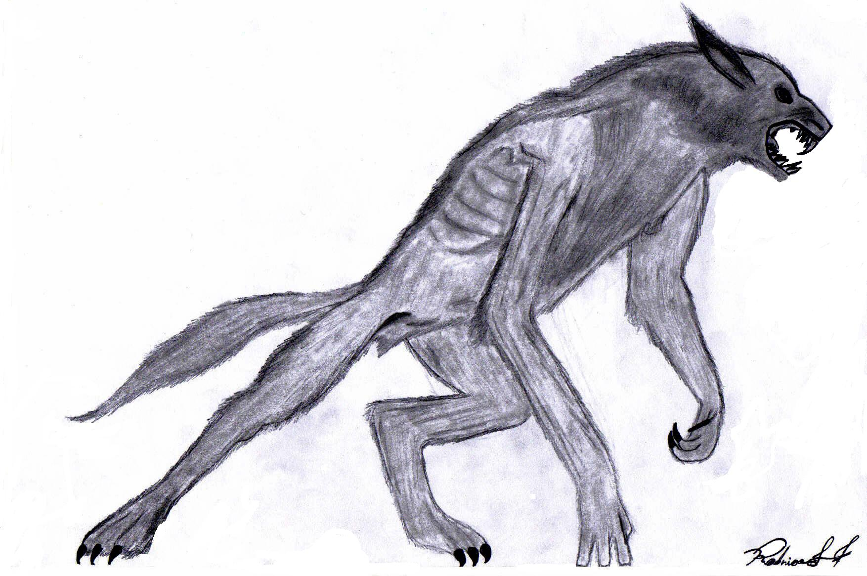 O Lobisomem, de Rodrigo Ferrarezi